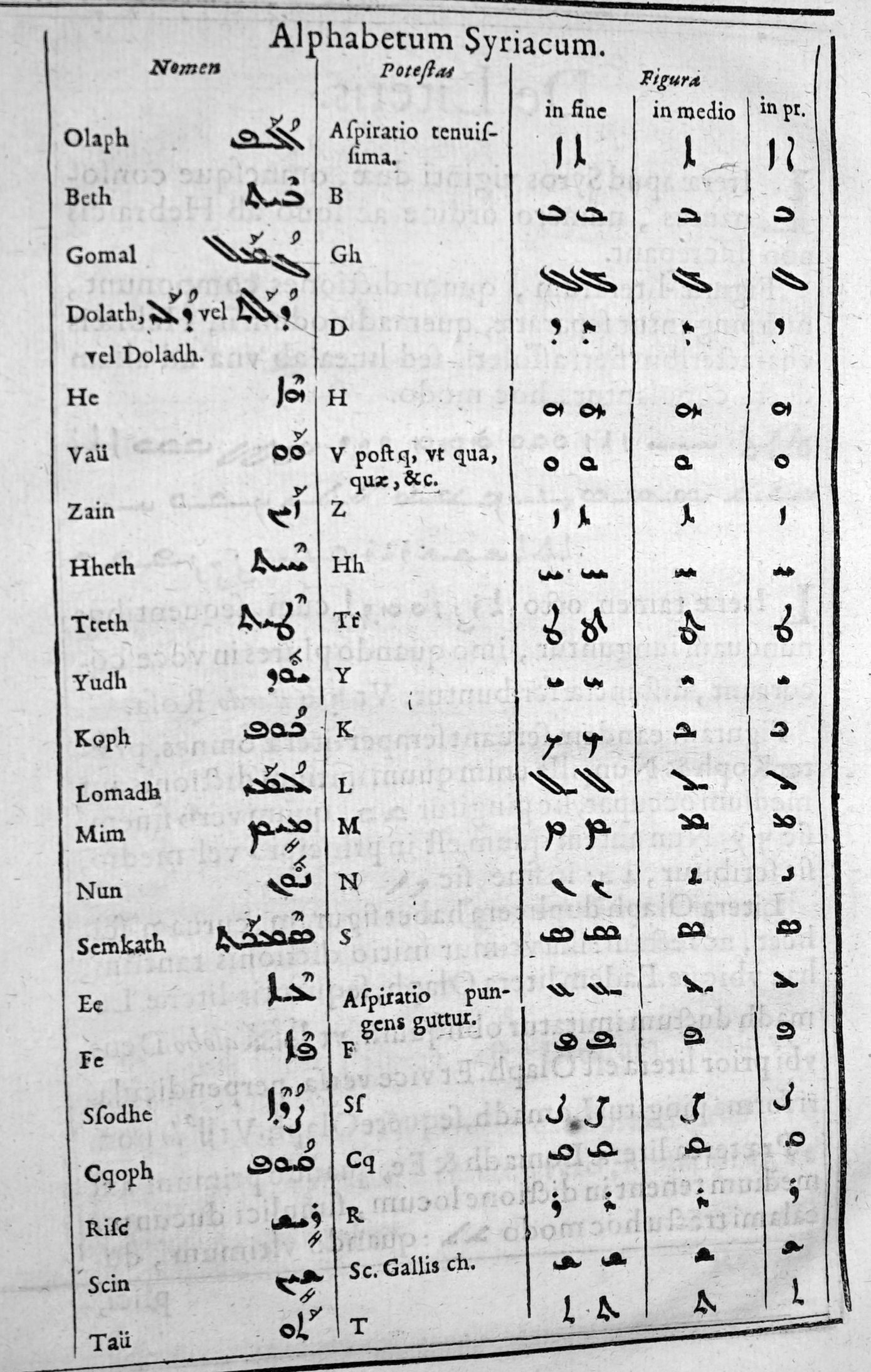 le Livre des Psaumes en version bilingue syriaque-latin. Caractères utilisé par Guillaume Le Bé(?) et créés par F. Savary de Brèves.